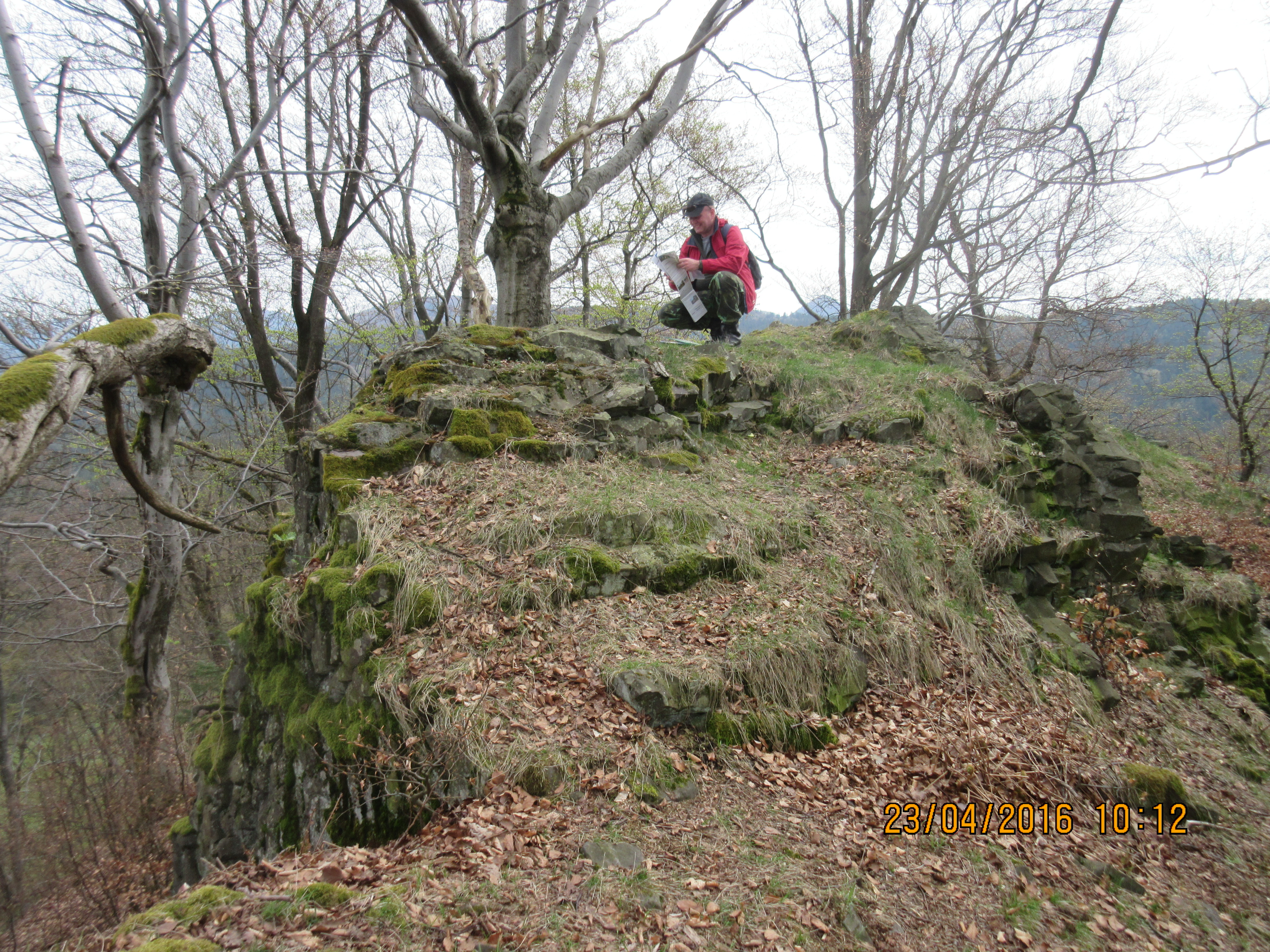 Vrcholová skála na Ovčáckém vrchu 623 m. n.m., asi Lužické hory u Horního Prysku